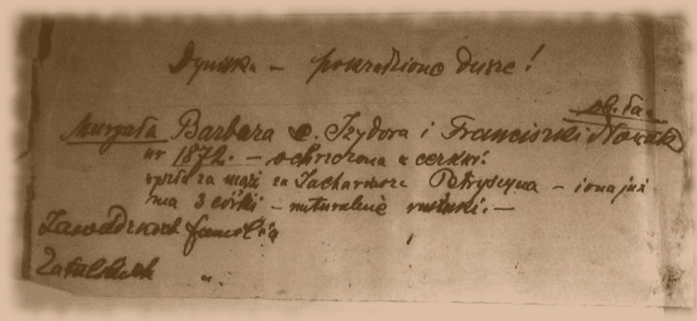 Fragment księgi metrykalnej parafii rzymskokatolickiej w Dyniskach z wpisem dotyczącym "kradzieży dusz"